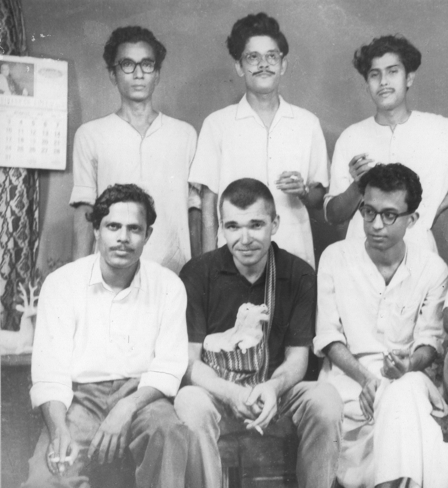 Bhookhi Peedhi